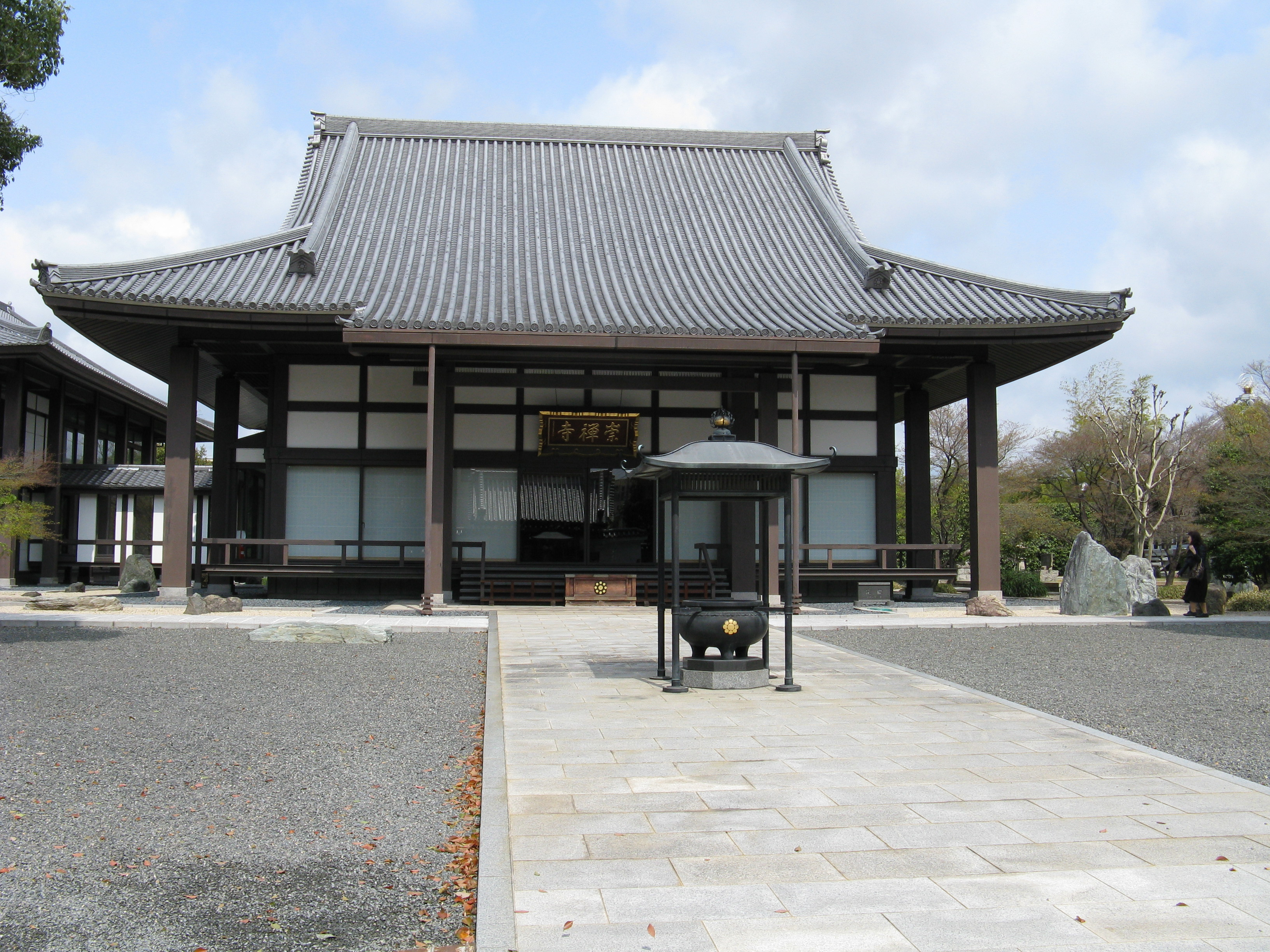 崇禅寺 本堂